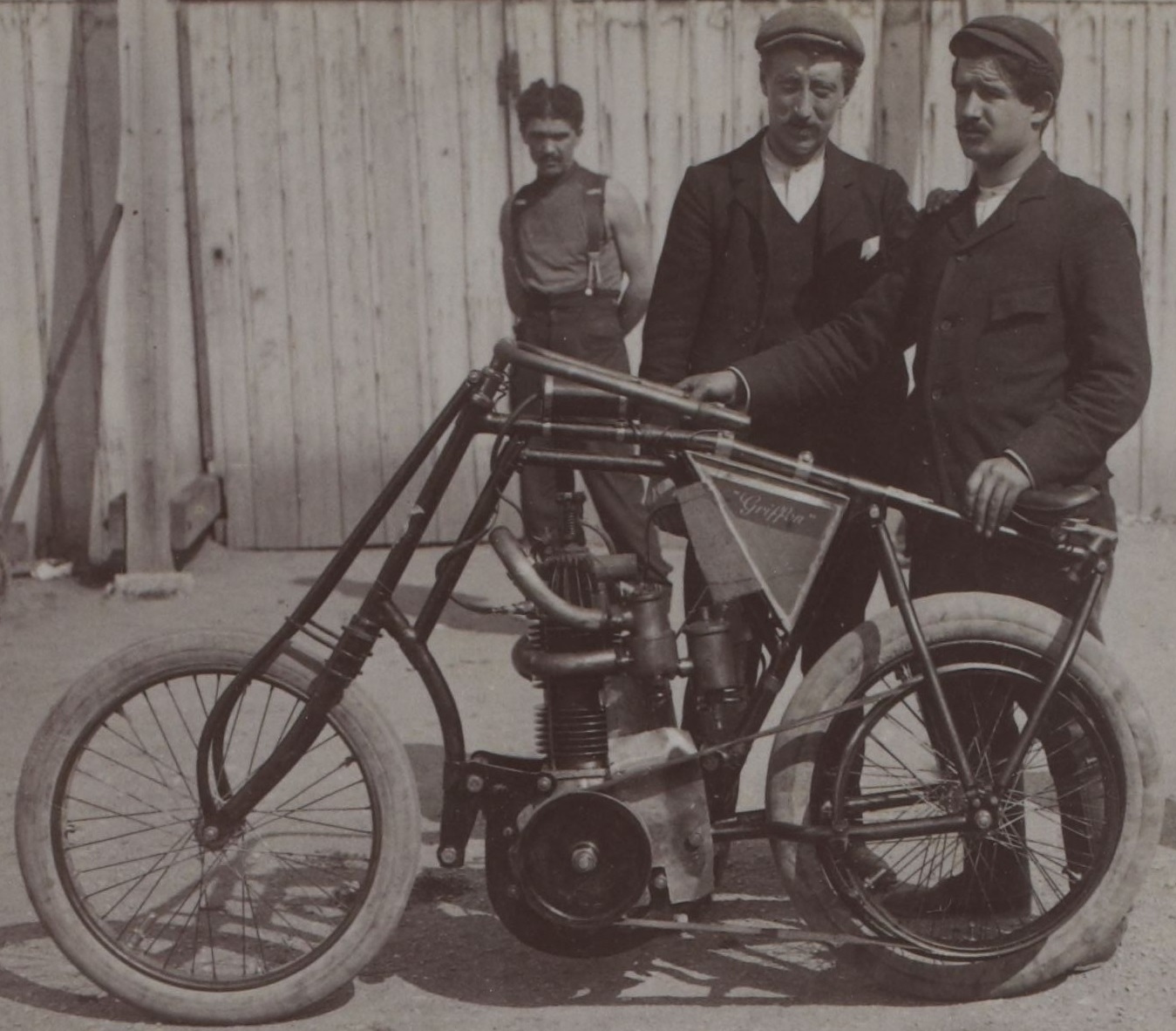 [Collection Jules Beau. Photographie sportive] : T. 22. AnnÃ©e 1903 / Jules Beau : F. 18. Rigal ; Gabriel